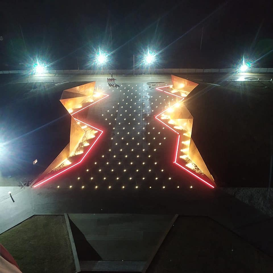 Ржевский мемориал советскому солдату. Аллея. Подсветка. Скульптор — Андрей Коробцов, архитектор — Константин Фомин. 2020 г.